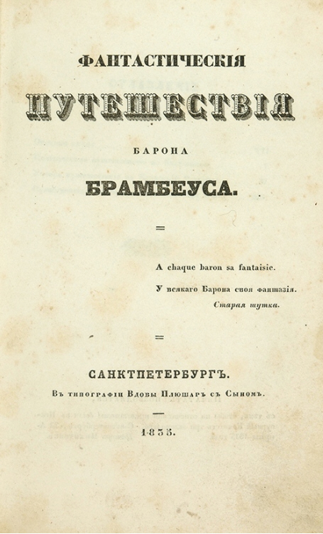 Фантастические путешествия Барона Брамбеуса